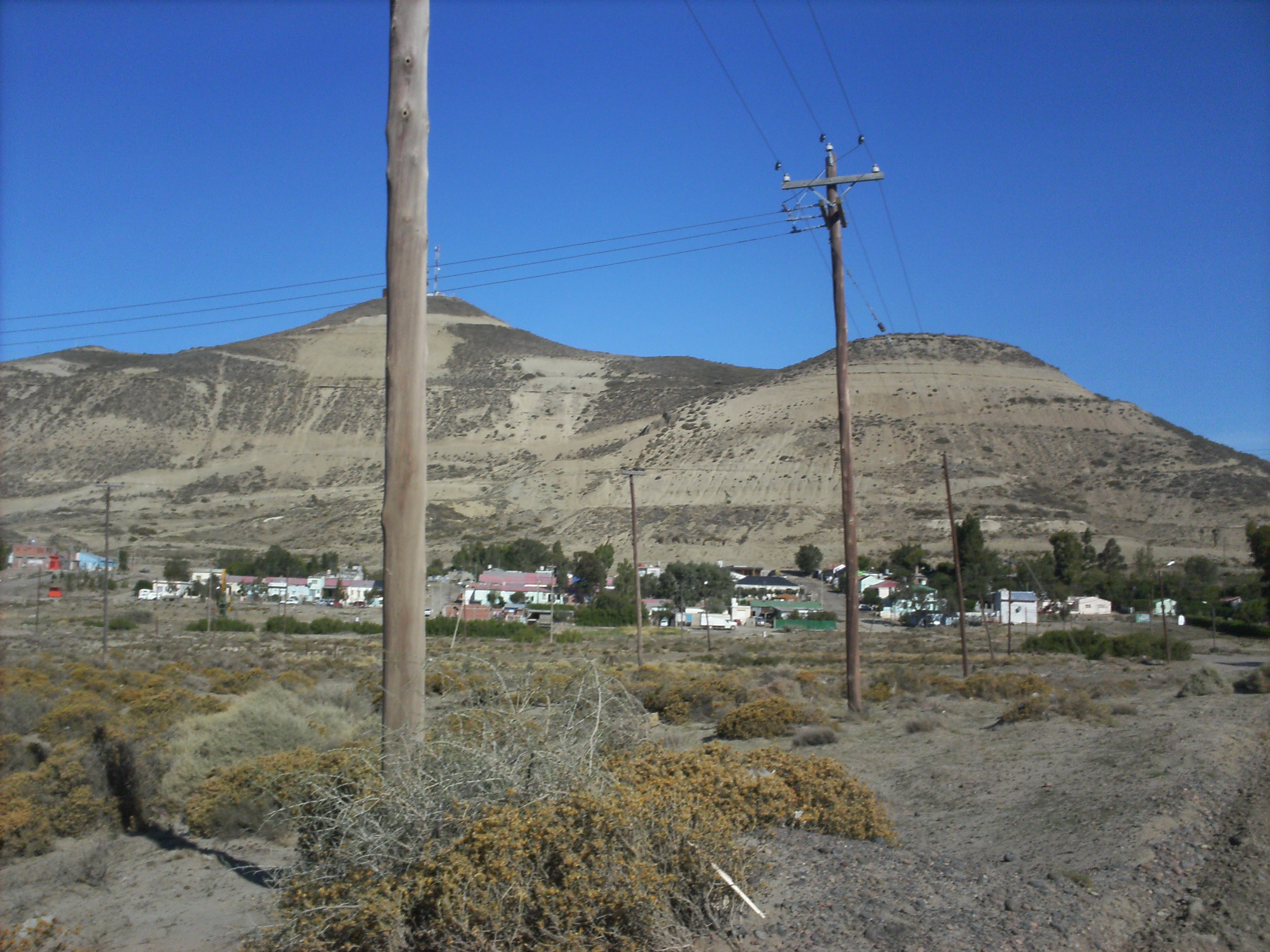 Vista general del barrio